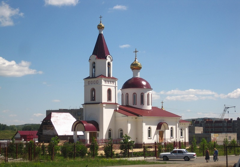 Церковь в Межозёрном